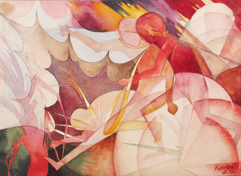 Aquarell (Futorismus), Granateneinschlag im Ersten Weltkrieg 1918 an der Somme, entstand in englischer Kriegsgefangenschaft im camp Colsterdale, Yorkshire 1919.